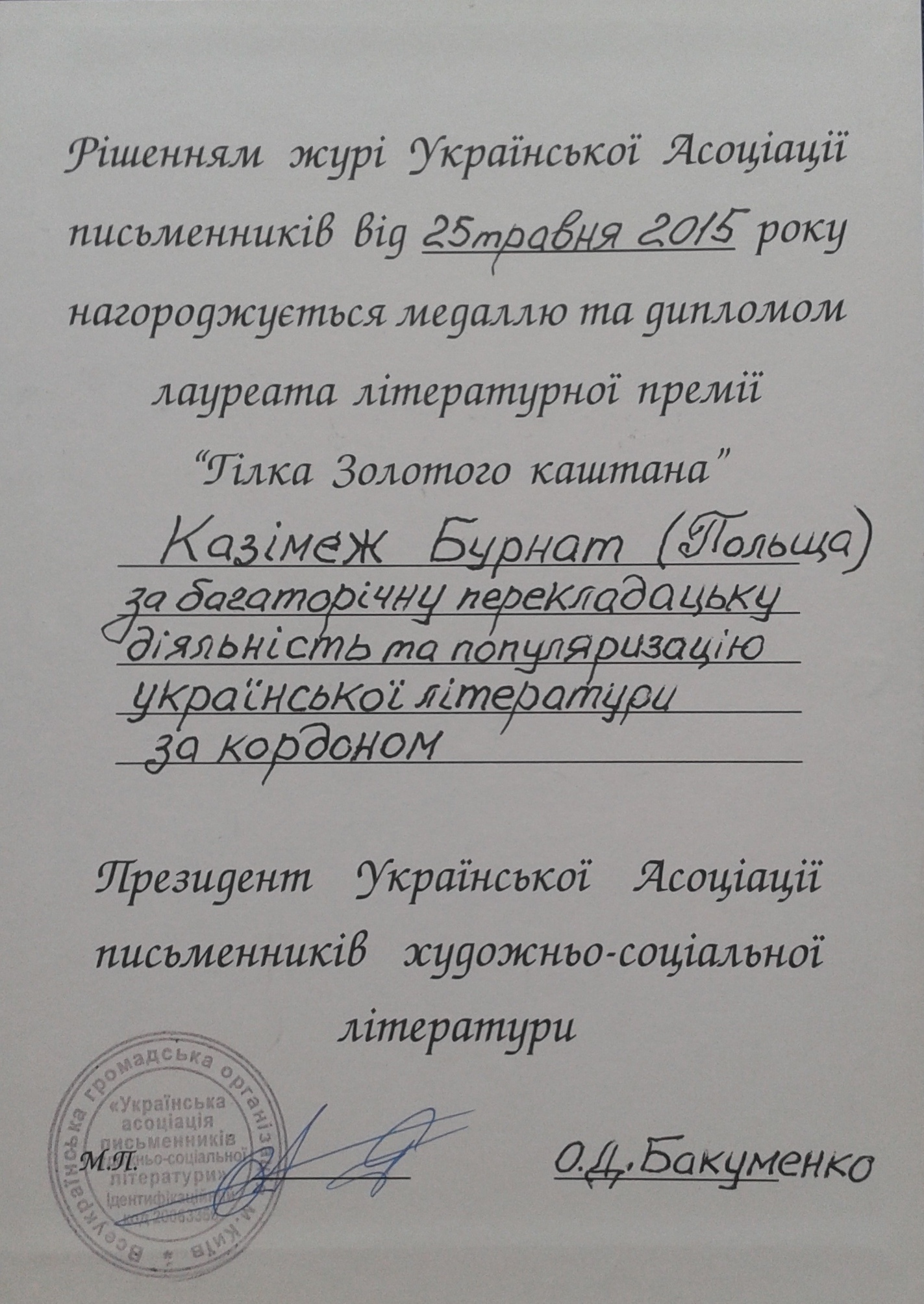 Гілка золотого каштану – диплом всередині